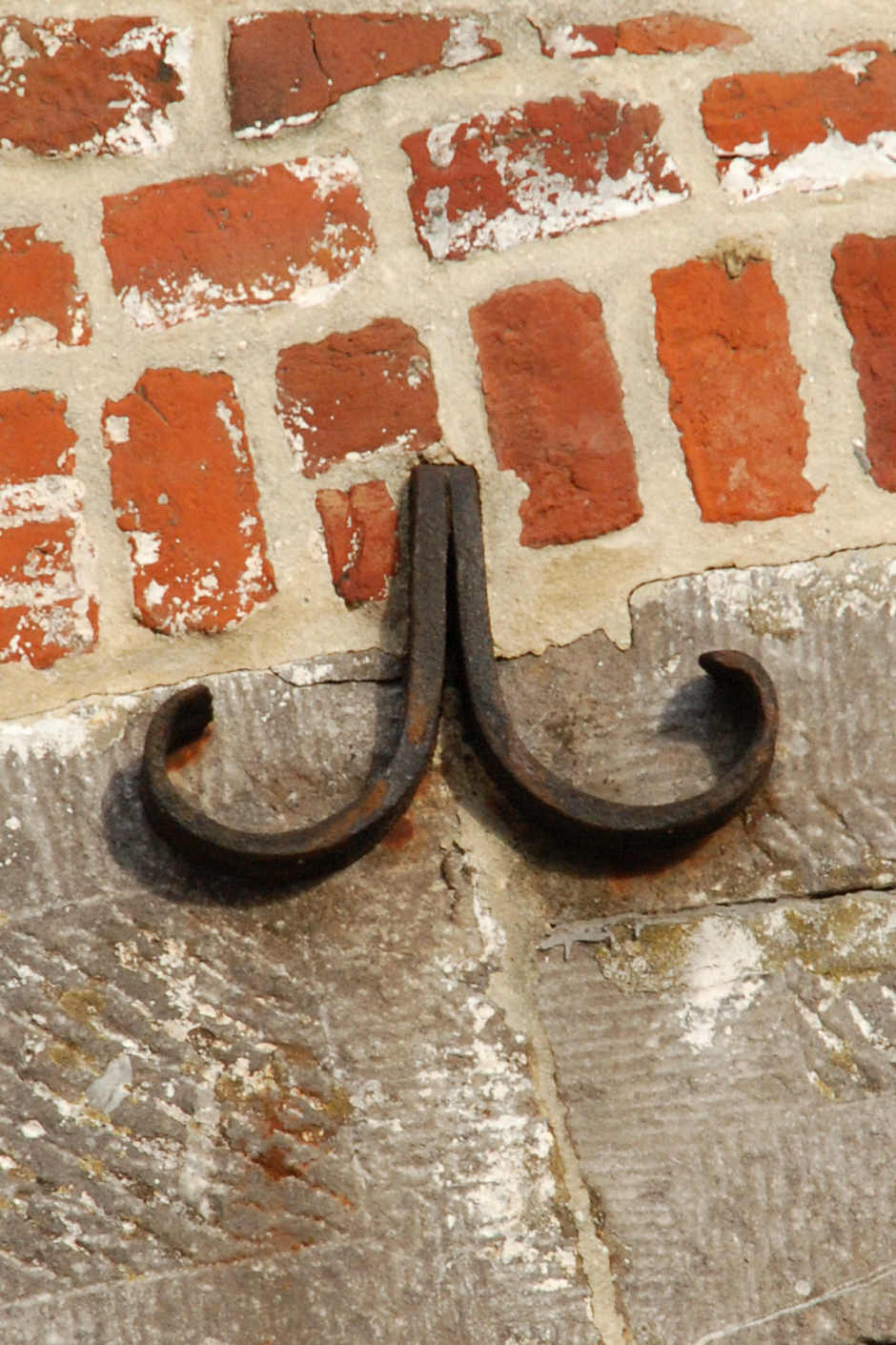 Belgique - Wallonie - Ottignies - Ferme du Douaire